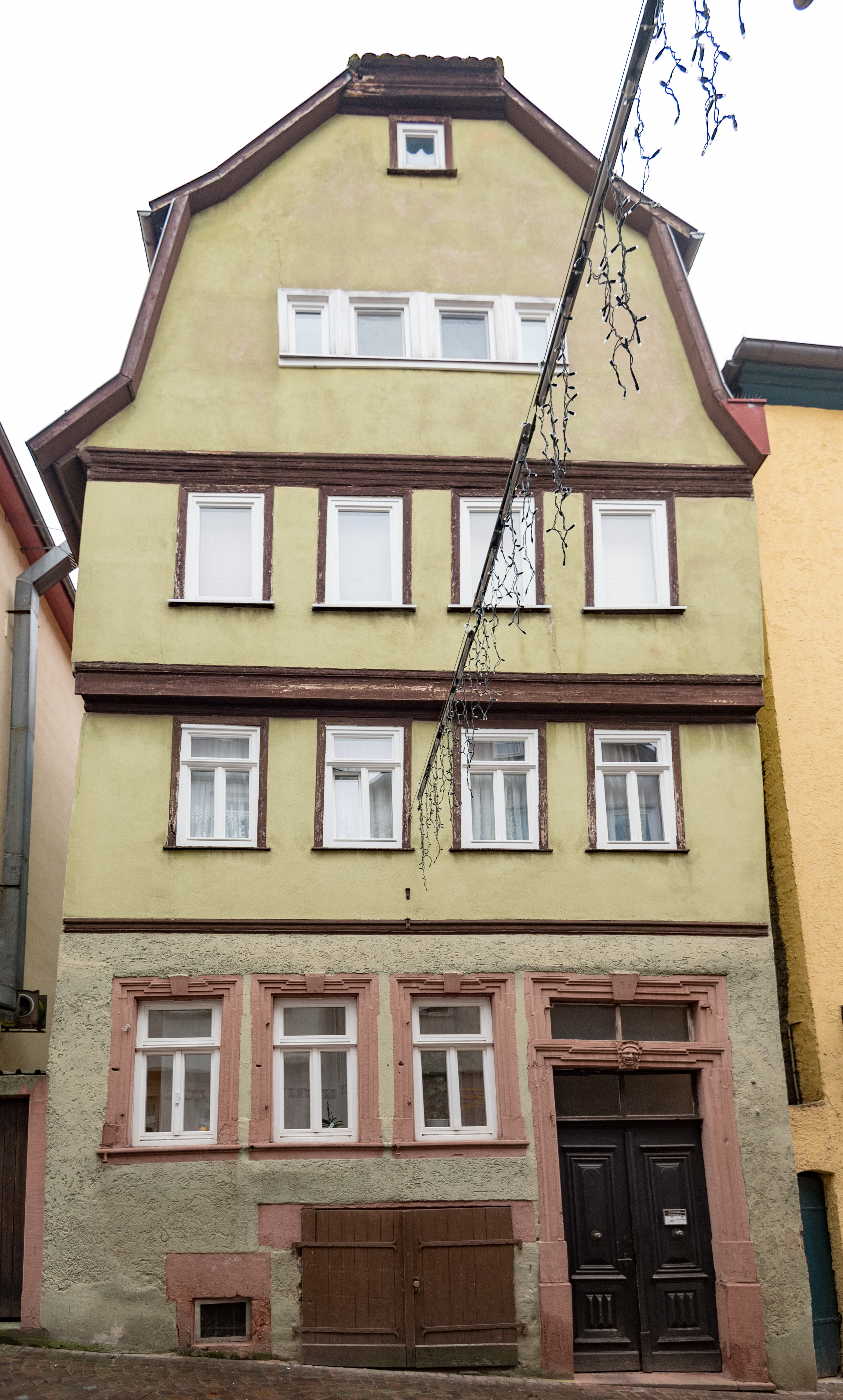 Wertheim, Hospitalstraße 2